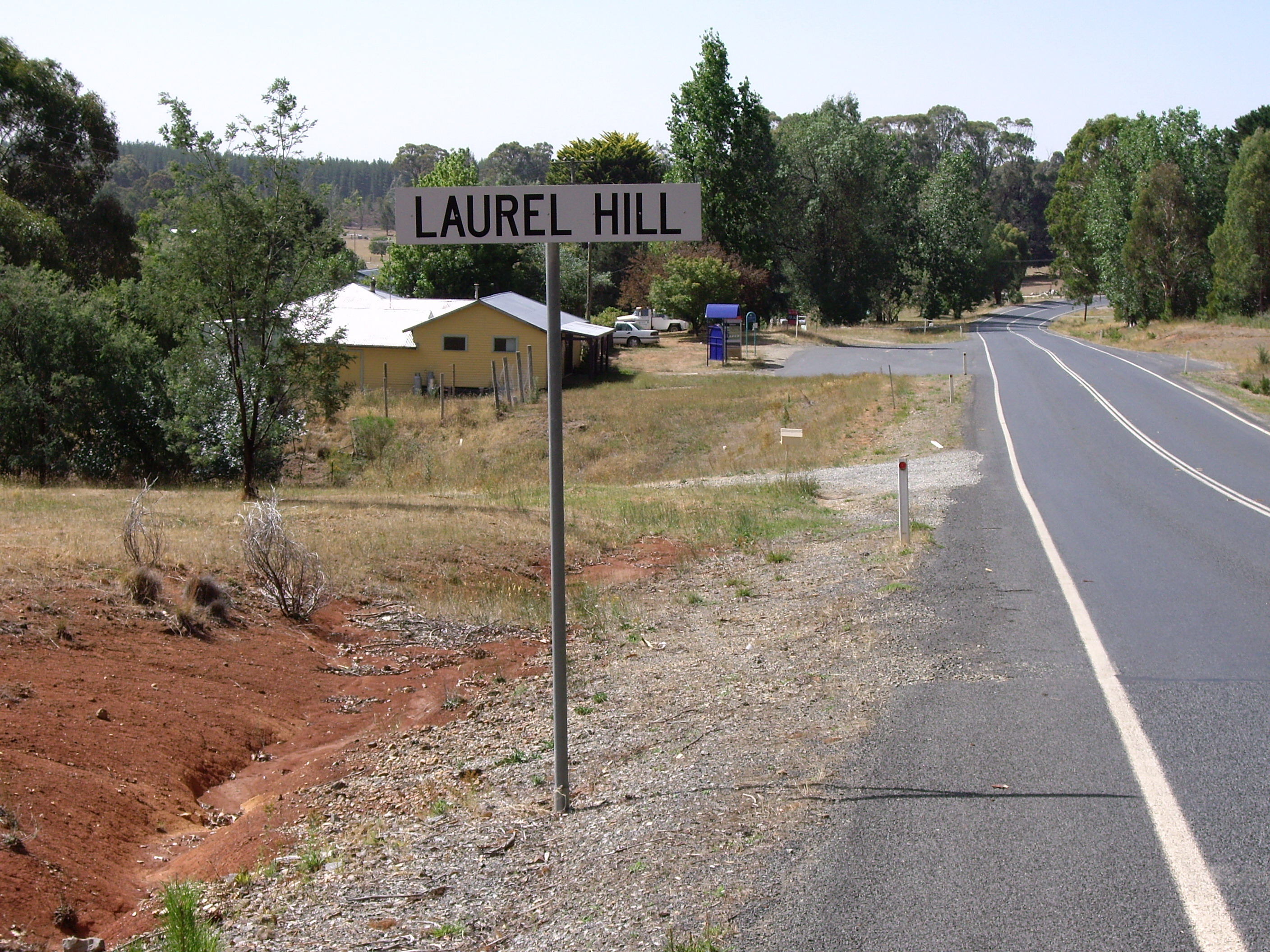 Entering Laurel Hill